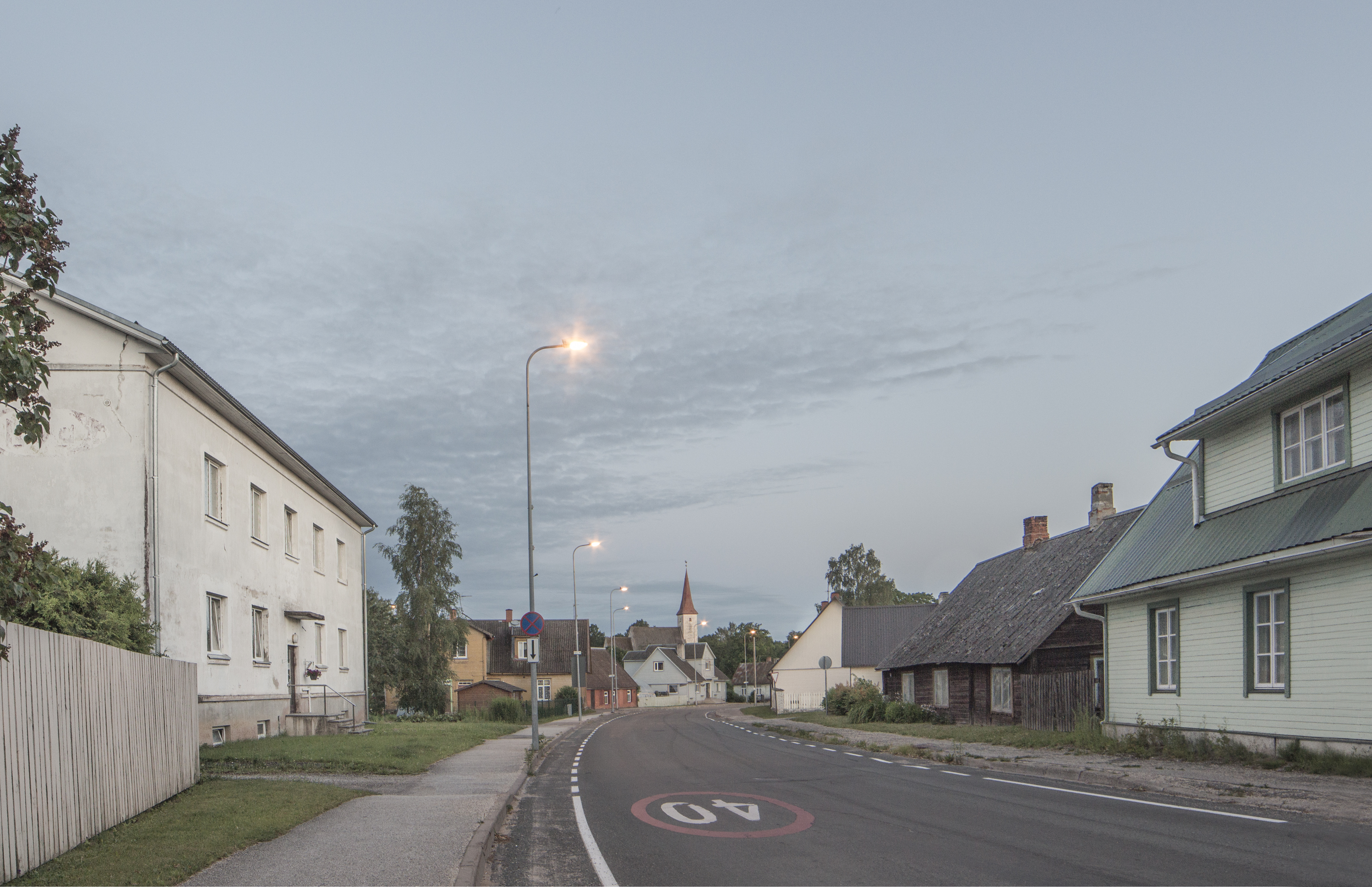 Linna tuiksoon.